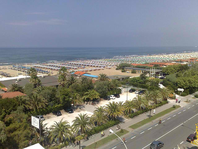 Blick vom Hoteldach aufs Meer, Marina di Pietrasanta - Italien.